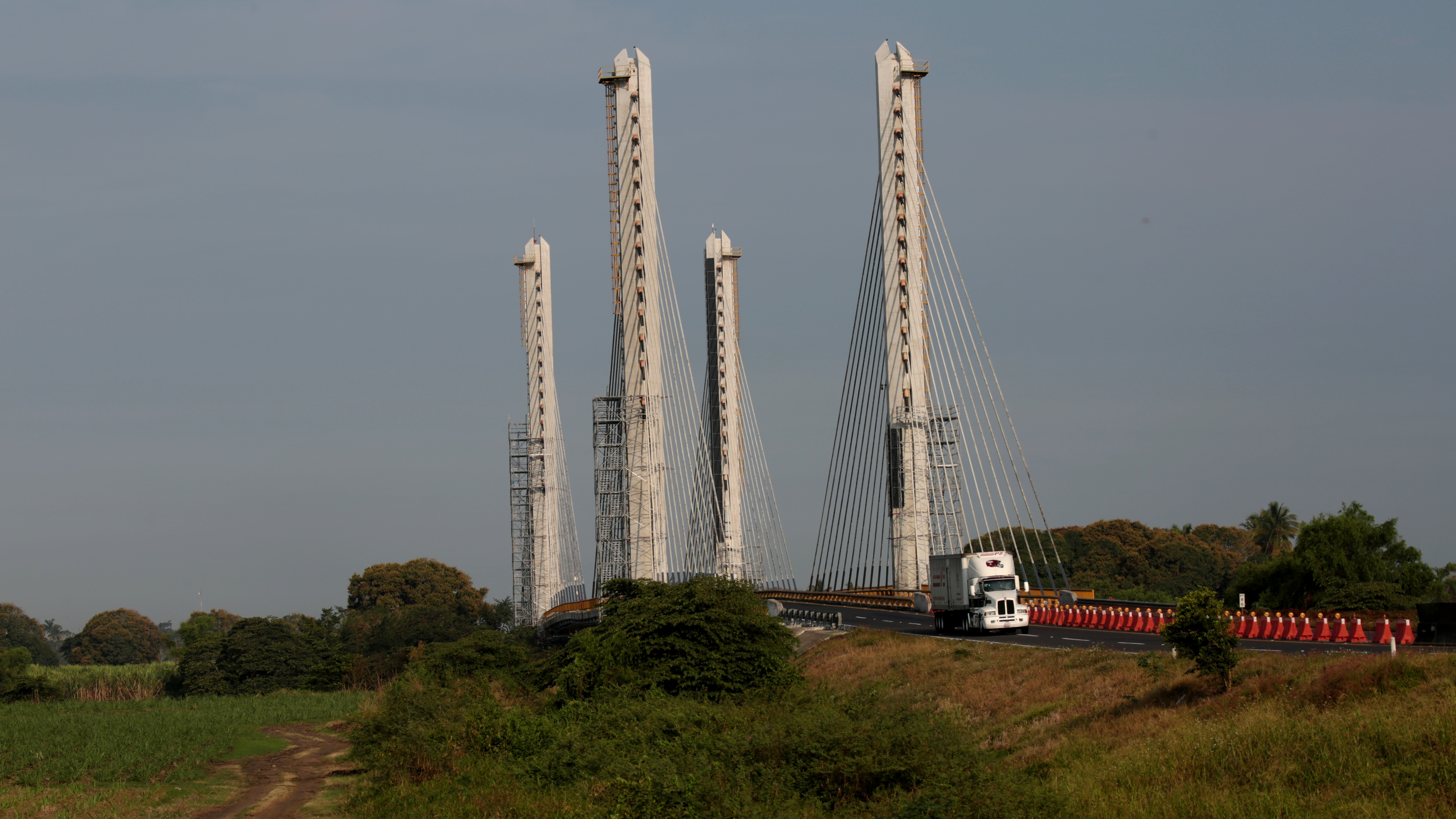 Puente río Papaloapan